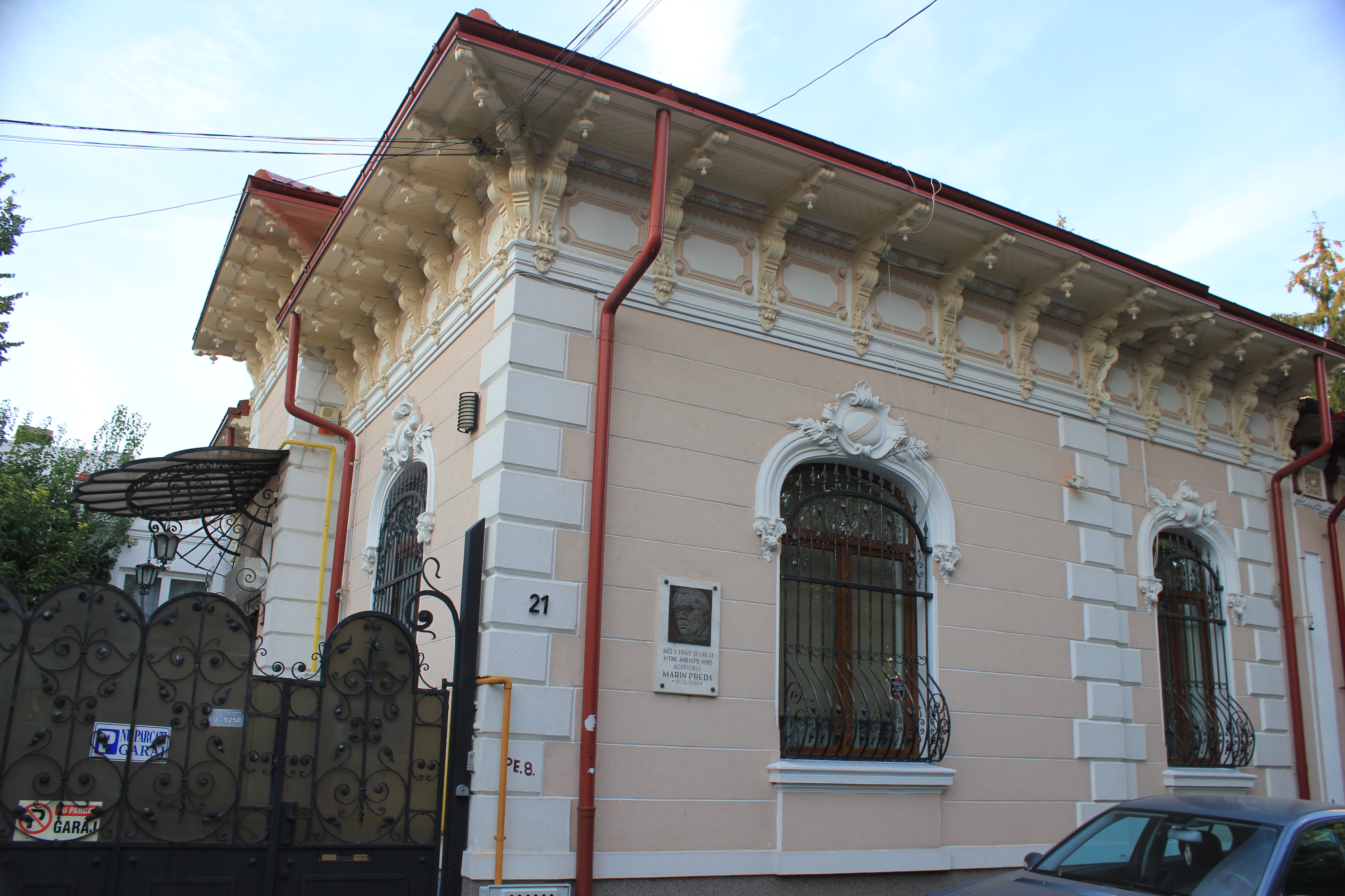 Casa Romano Alexandru 21